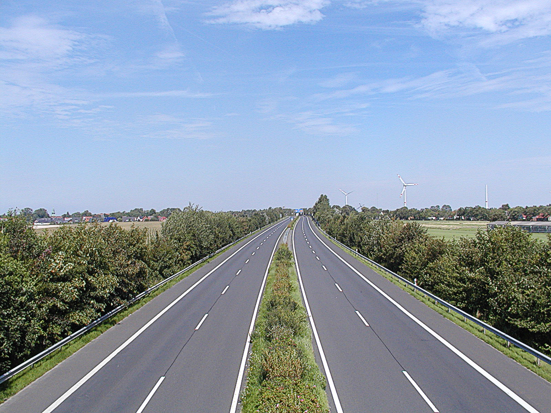 Das Ende der Bundesautobahn 27 in Cuxhaven